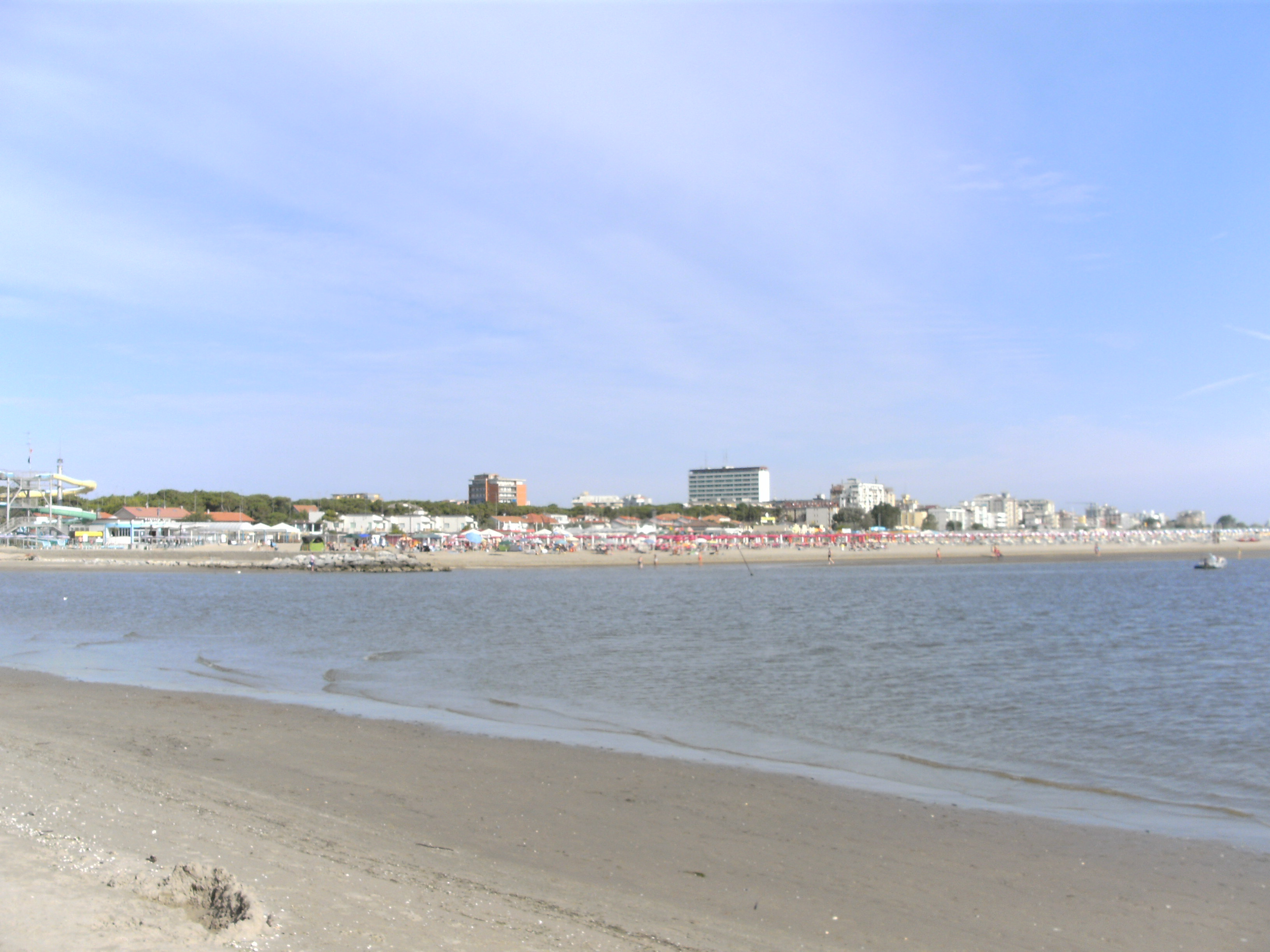 Lido degli Estemsi (Comacchio, FE), südliches Strandgebiet, vom Südufer des Logonovo-Kanals aus gesehen